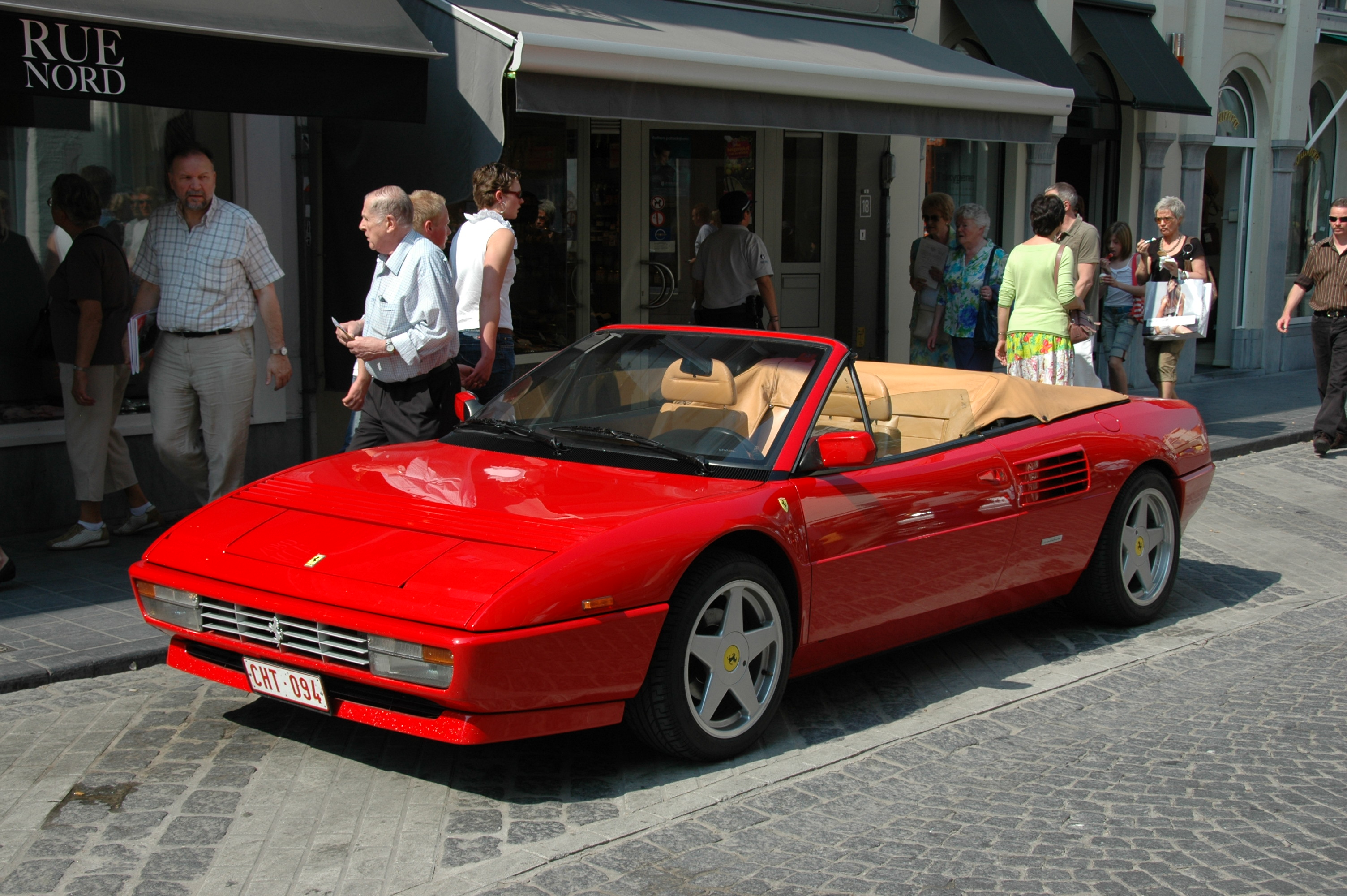 Mondial T.